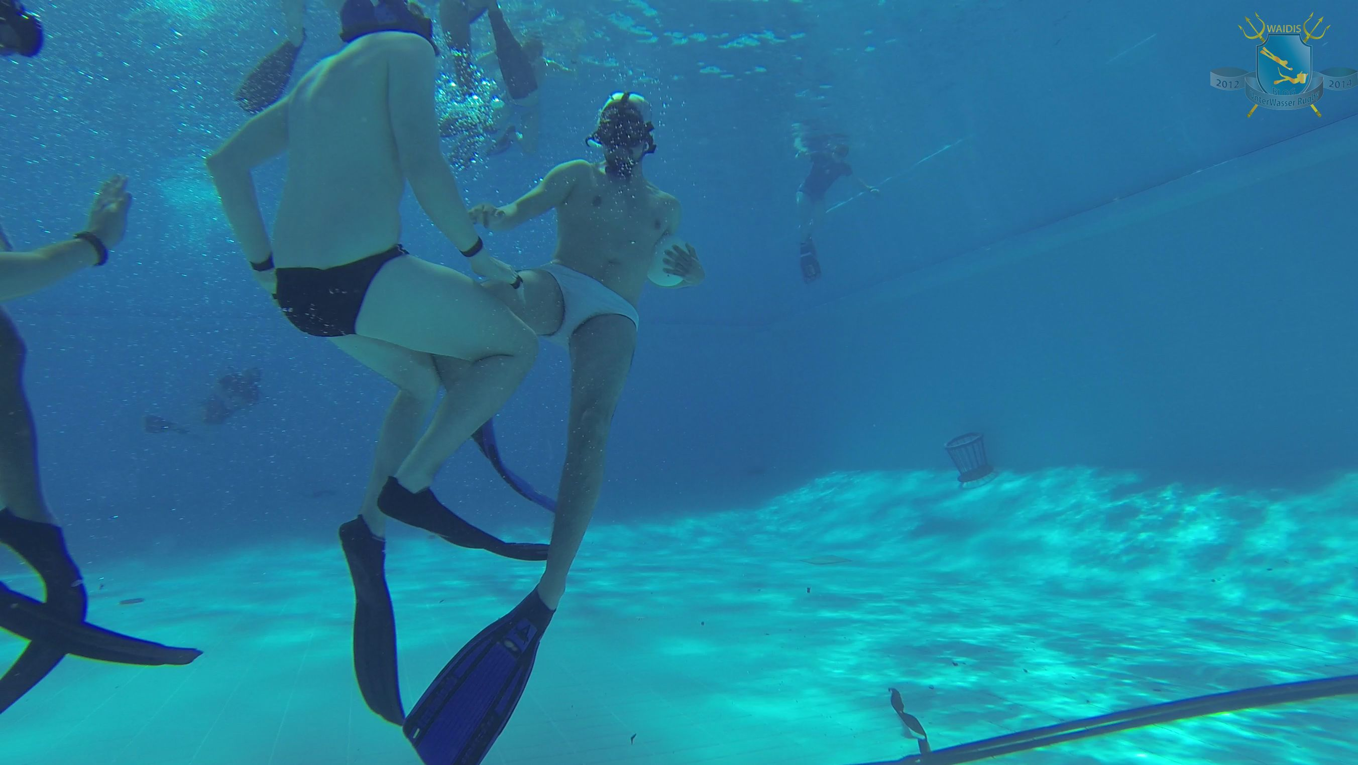 Unterwasser Rugby